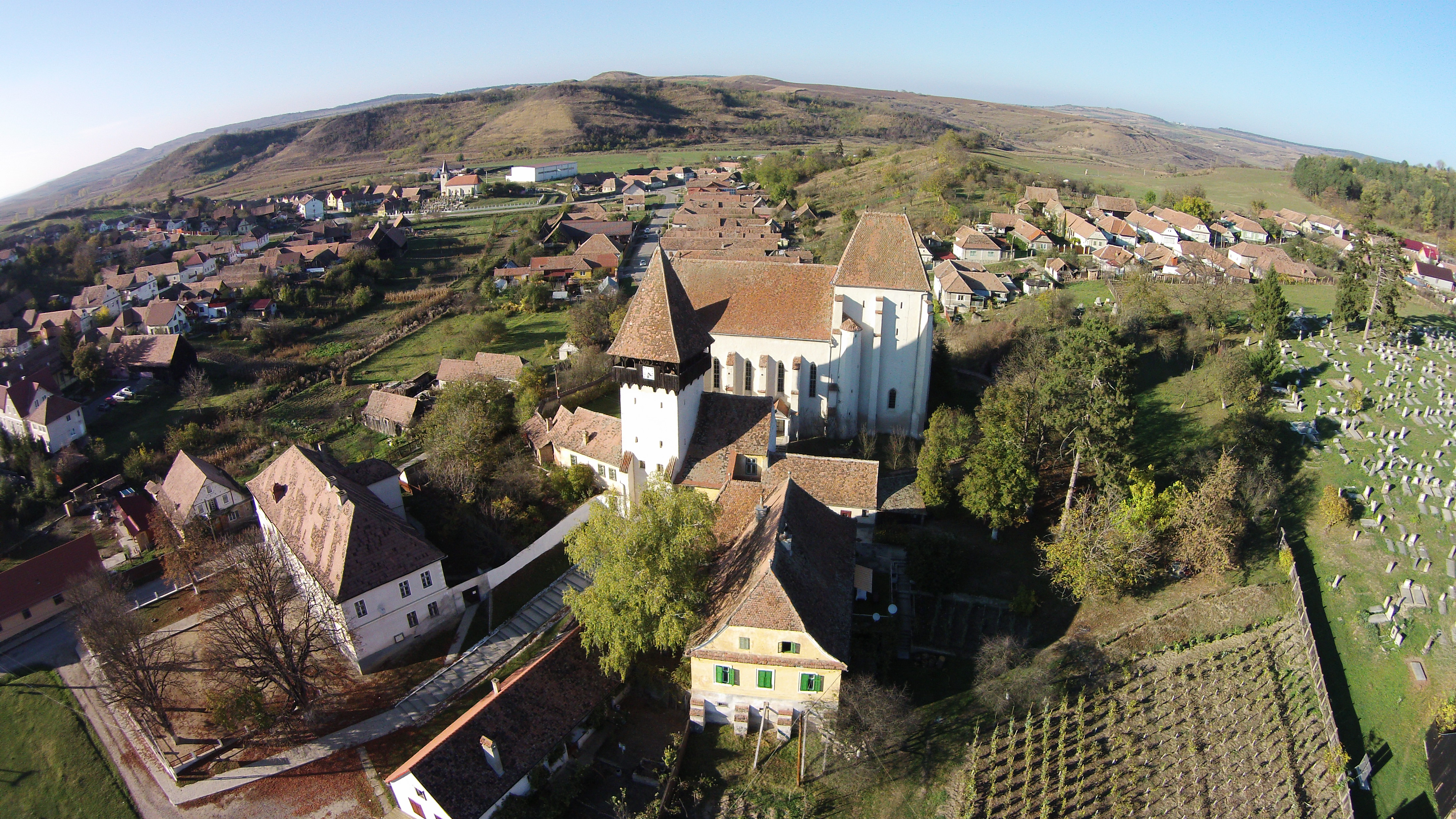 Vedere aeriana a bisericii fortificate